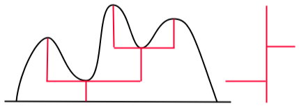 excursion associée à un arbre réel